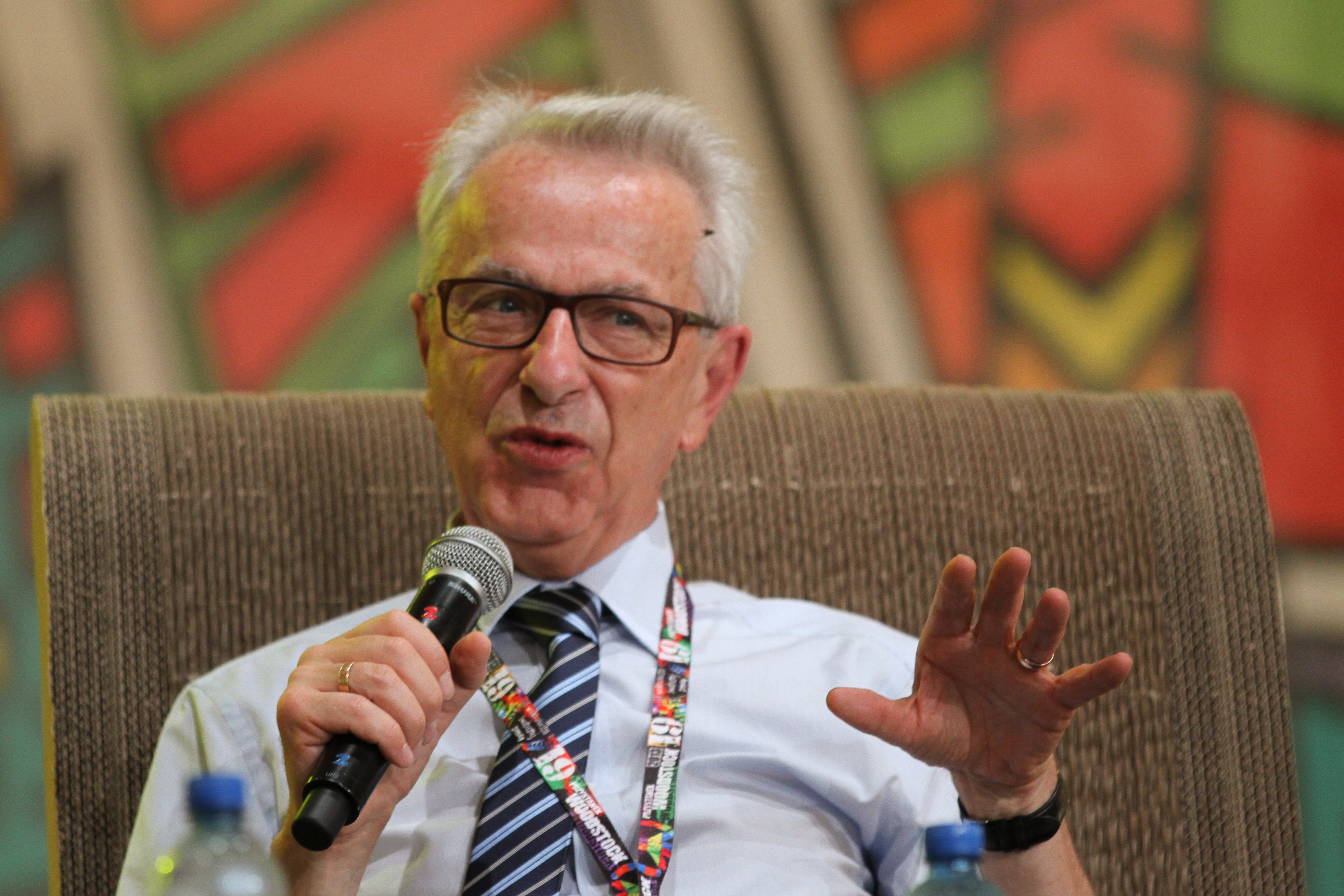 Przystanek Woodstock w 2013 r.